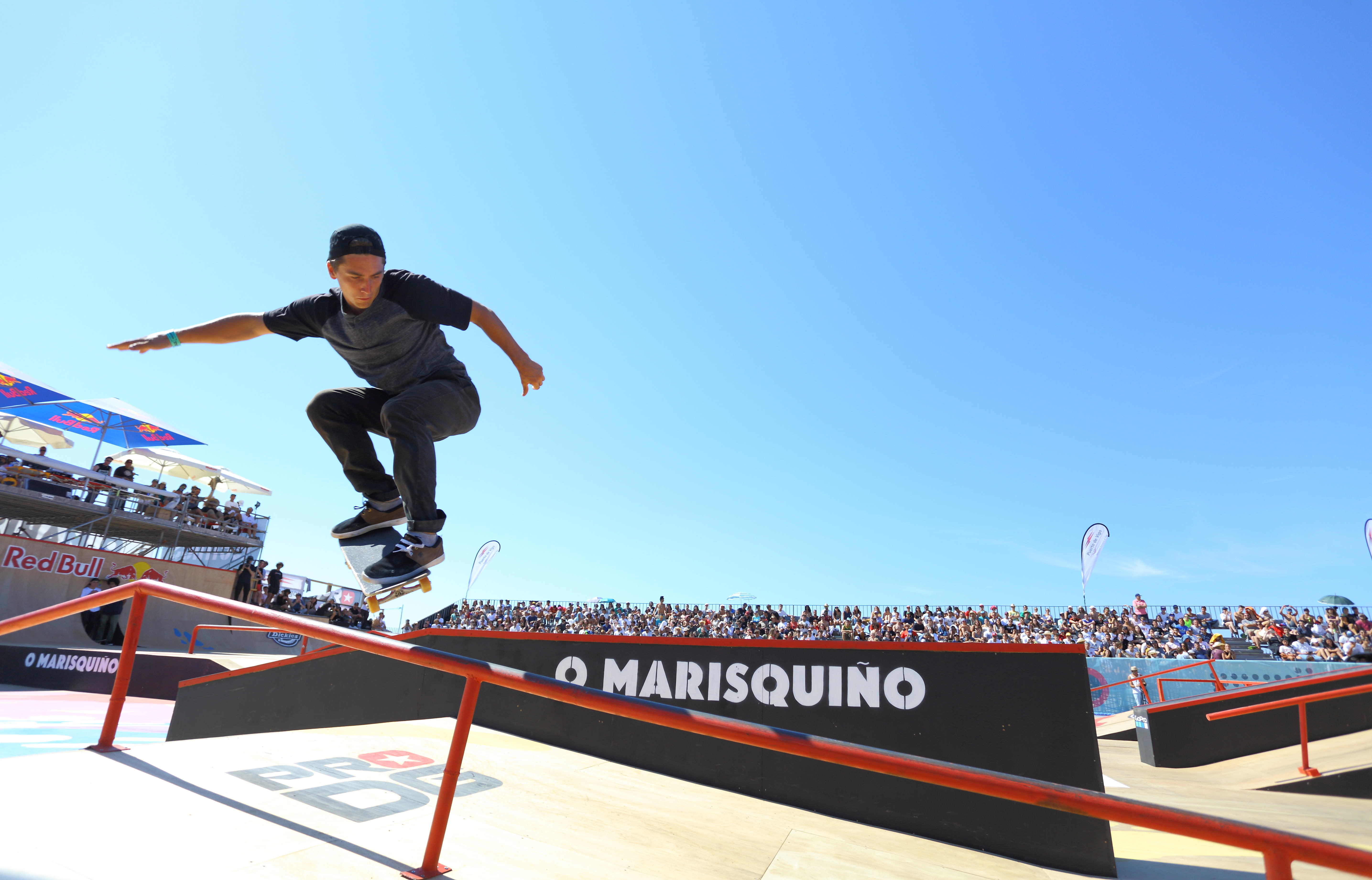 Vigo, 12 de agosto